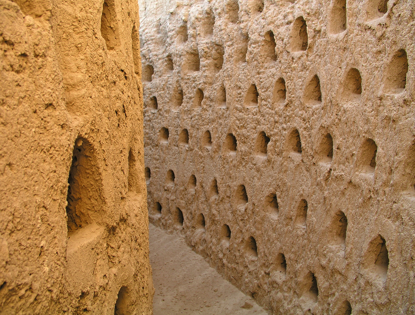 Palomar en ruinas en Palazuelo de Vedija (Tierra de Campos, Valladolid). Cara interna del muro exterior.